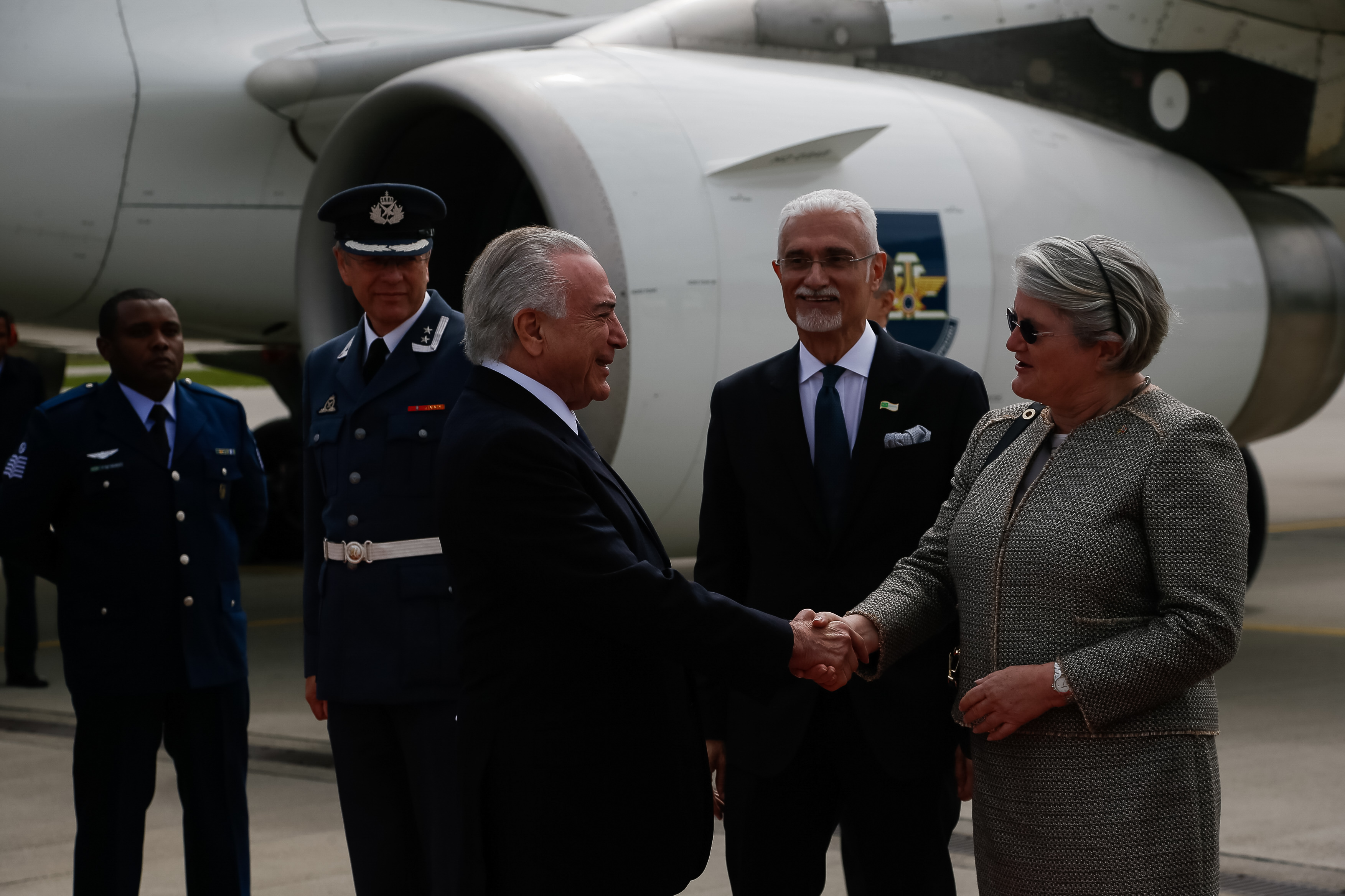 (Oslo - Noruega, 22/06/2017) Chegada a Oslo. Presidente da República, Michel Temer recebe os cumprimentos do Embaixadora Aud Marit Wiig, Embaixadora da Noruega no Brasil. Foto: Beto Barata/PR